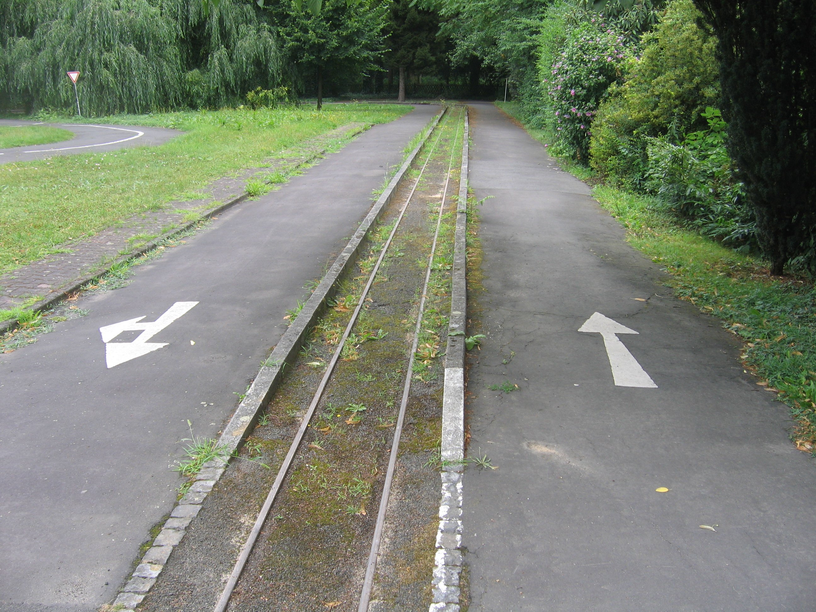 Jugendverkehrsgarten Frankfurt am Main, Straßenbahngleis